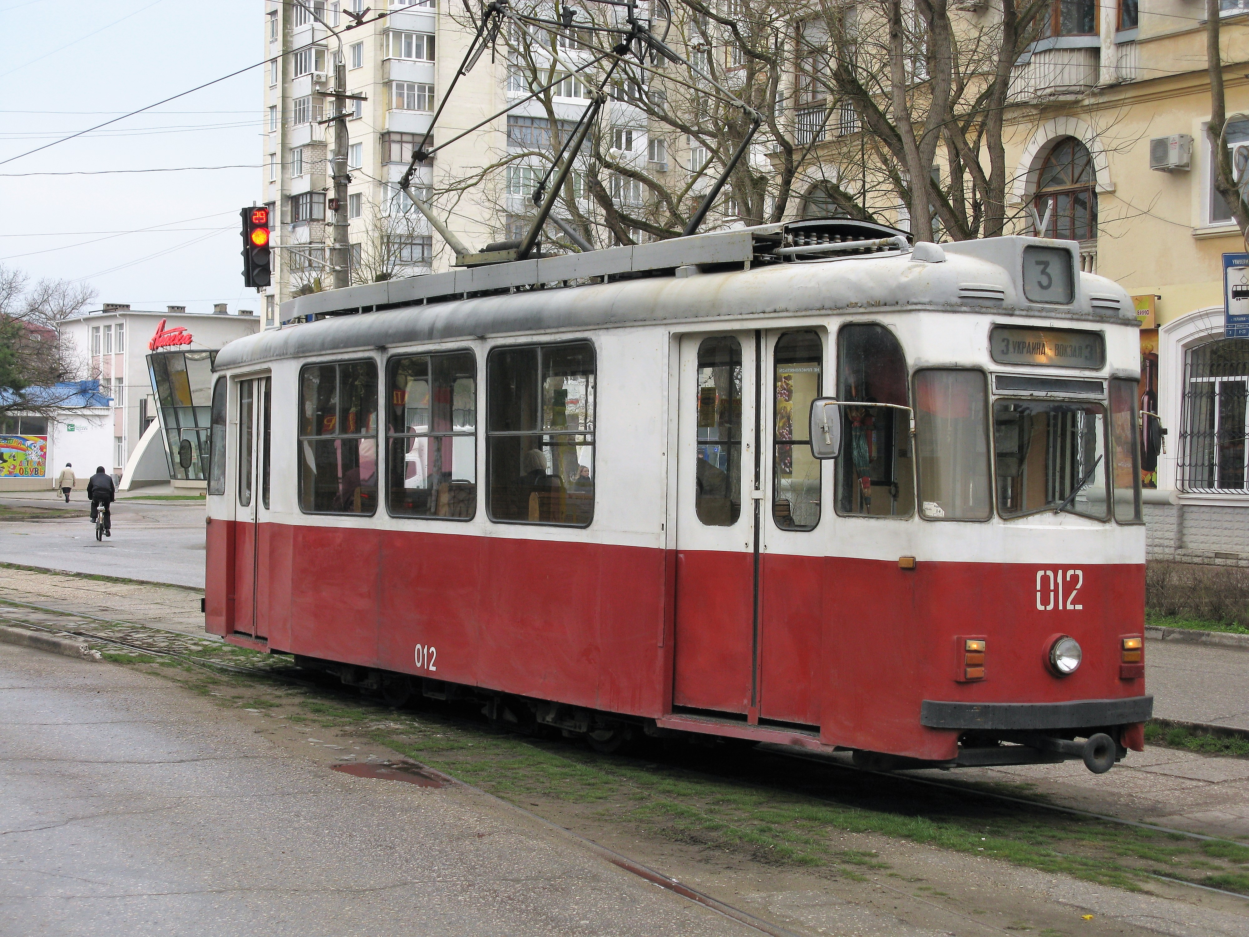 Трамвай Gotha T57 с бортовым номером 012 в Евпатории